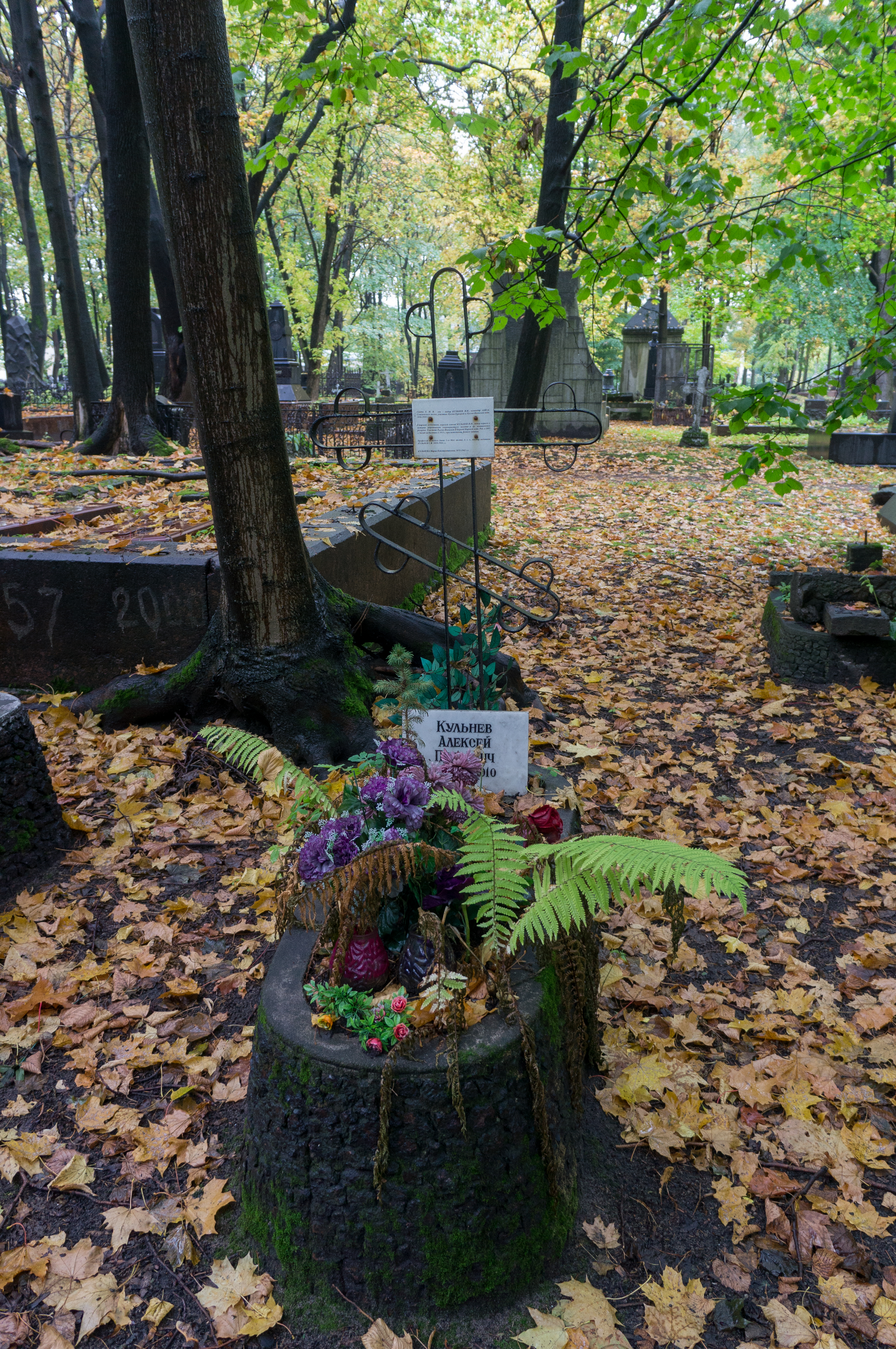 Могила Кульнева И.И. (1885-1915), морского летчика: проспект Московский, 100, Санкт-Петербург, Московский район, Санкт-Петербург